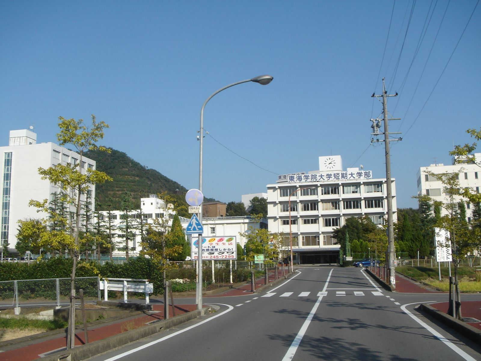 東海学院大学、岐阜県各務原市那加桐野町